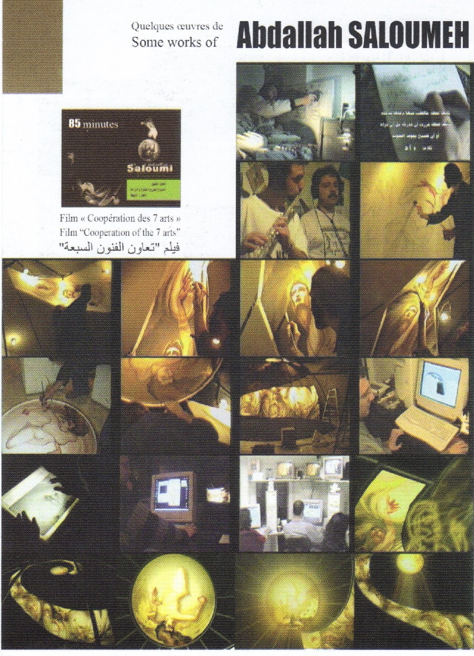 brochure